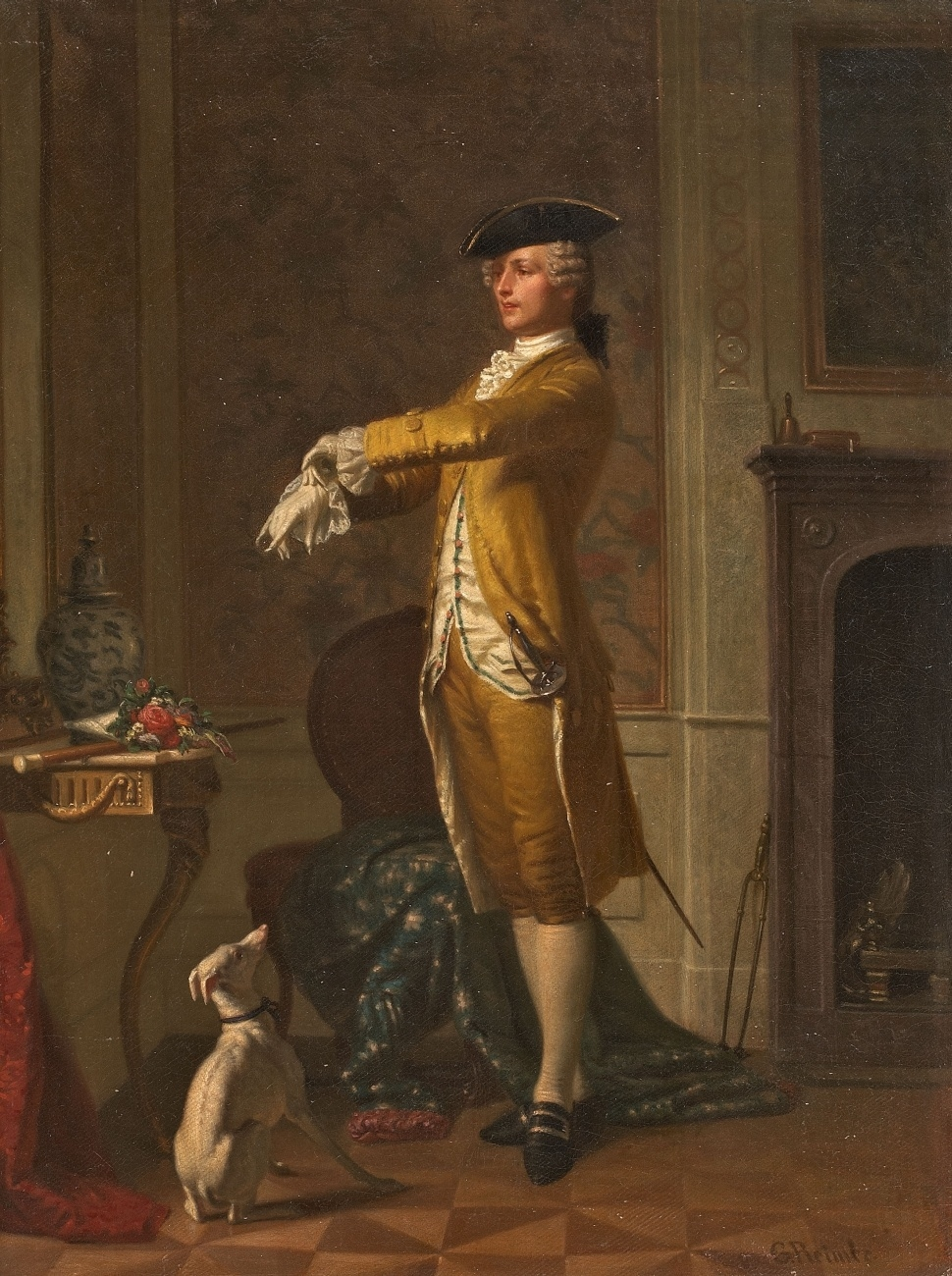 Junger Edelmann (im Rokoko-Kostüm) mit Hund. Signiert unten rechts: G. Reimer. Öl auf Leinwand. 49 x 37 cm.